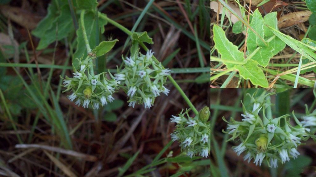 Oxypetalum crispum. Apocynaceae. Fotos tomadas al margen de la Ruta 5 sobre barranca en suelo arenoso húmedo, departamento de Rivera, Uruguay.